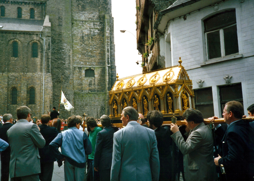 Soignies - Procession de la chasse de Saint Vincent.